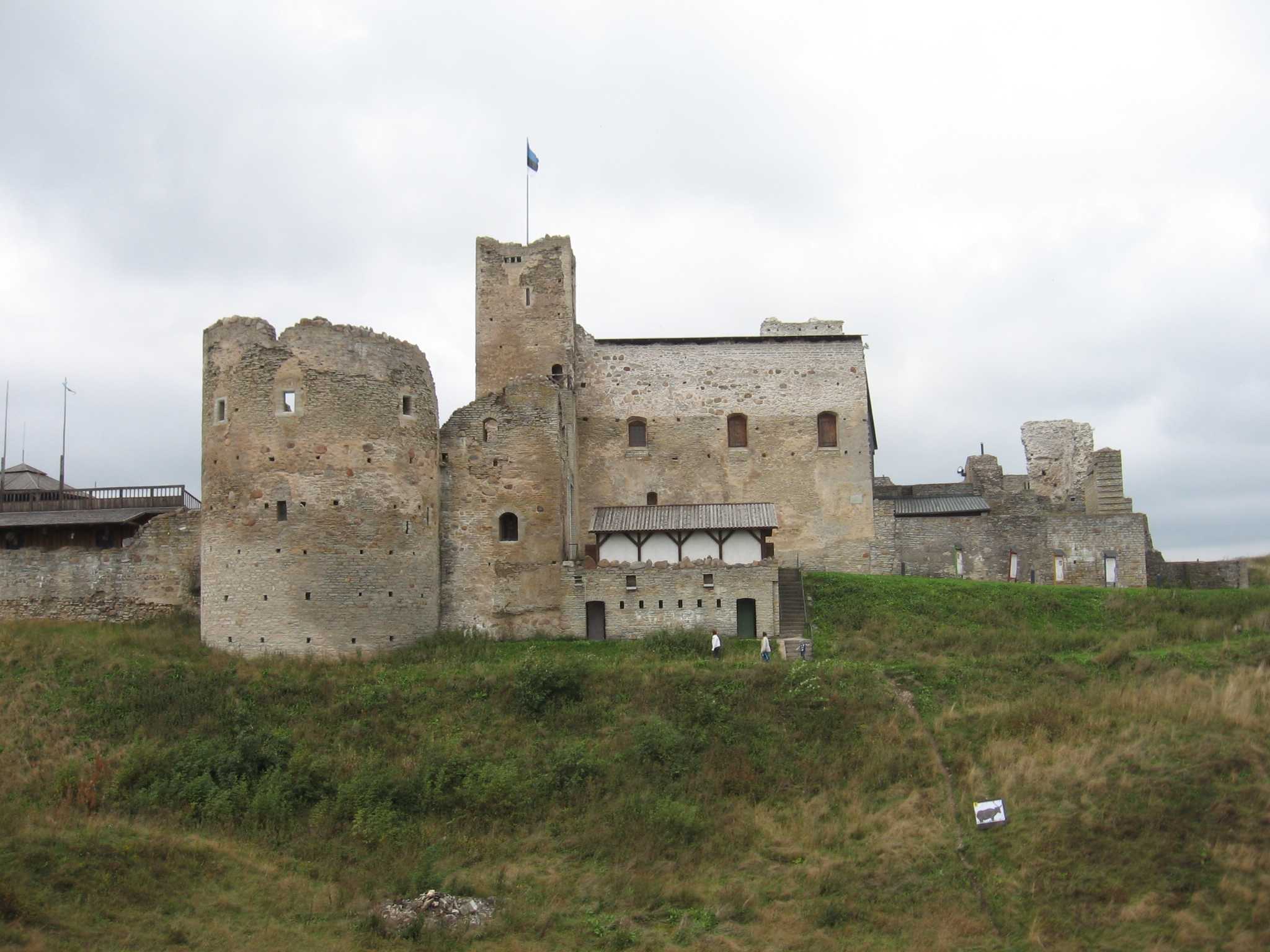 Rakvere linnuse varemed